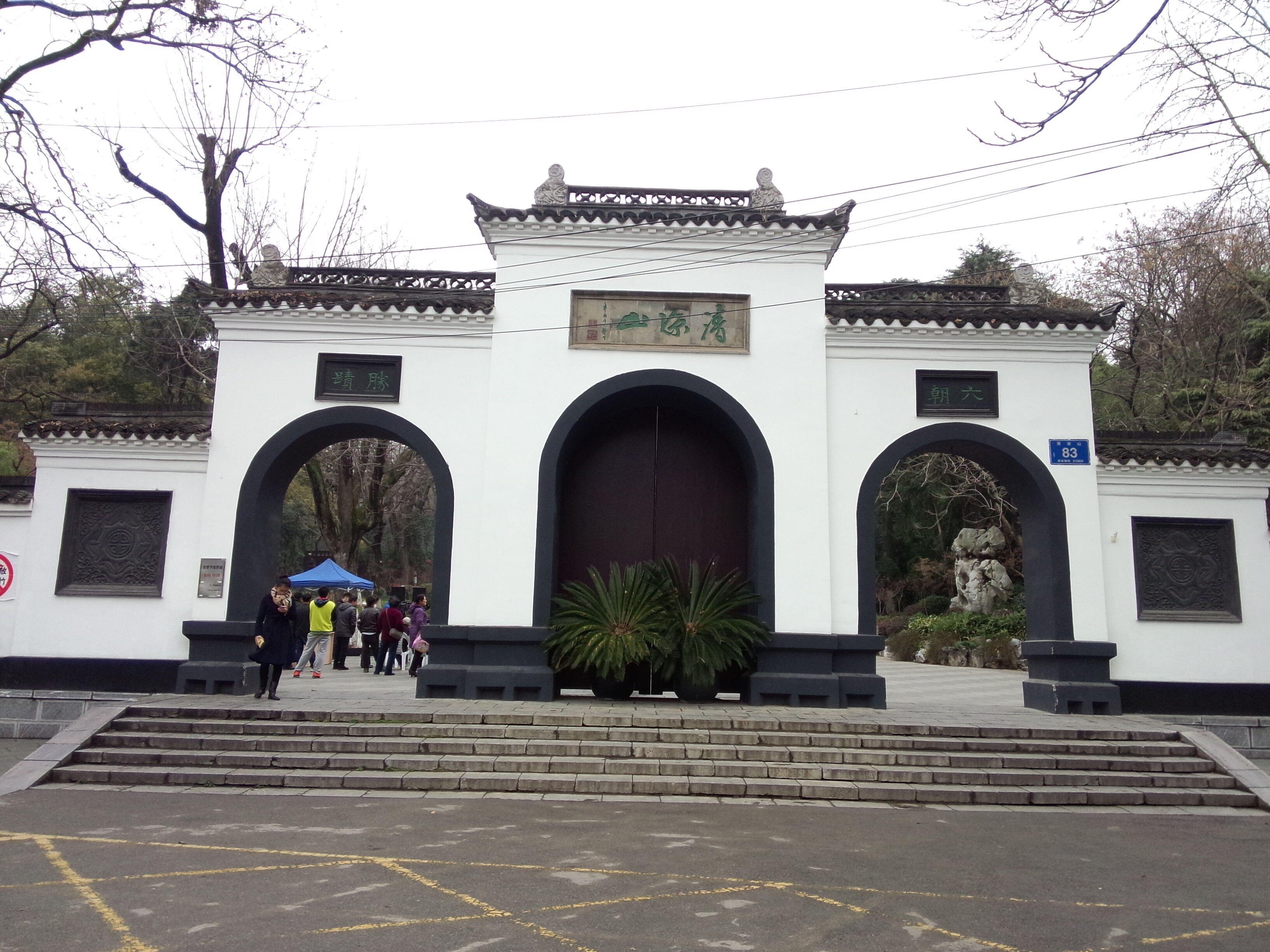 中文（中国大陆）: 南京清凉山山门